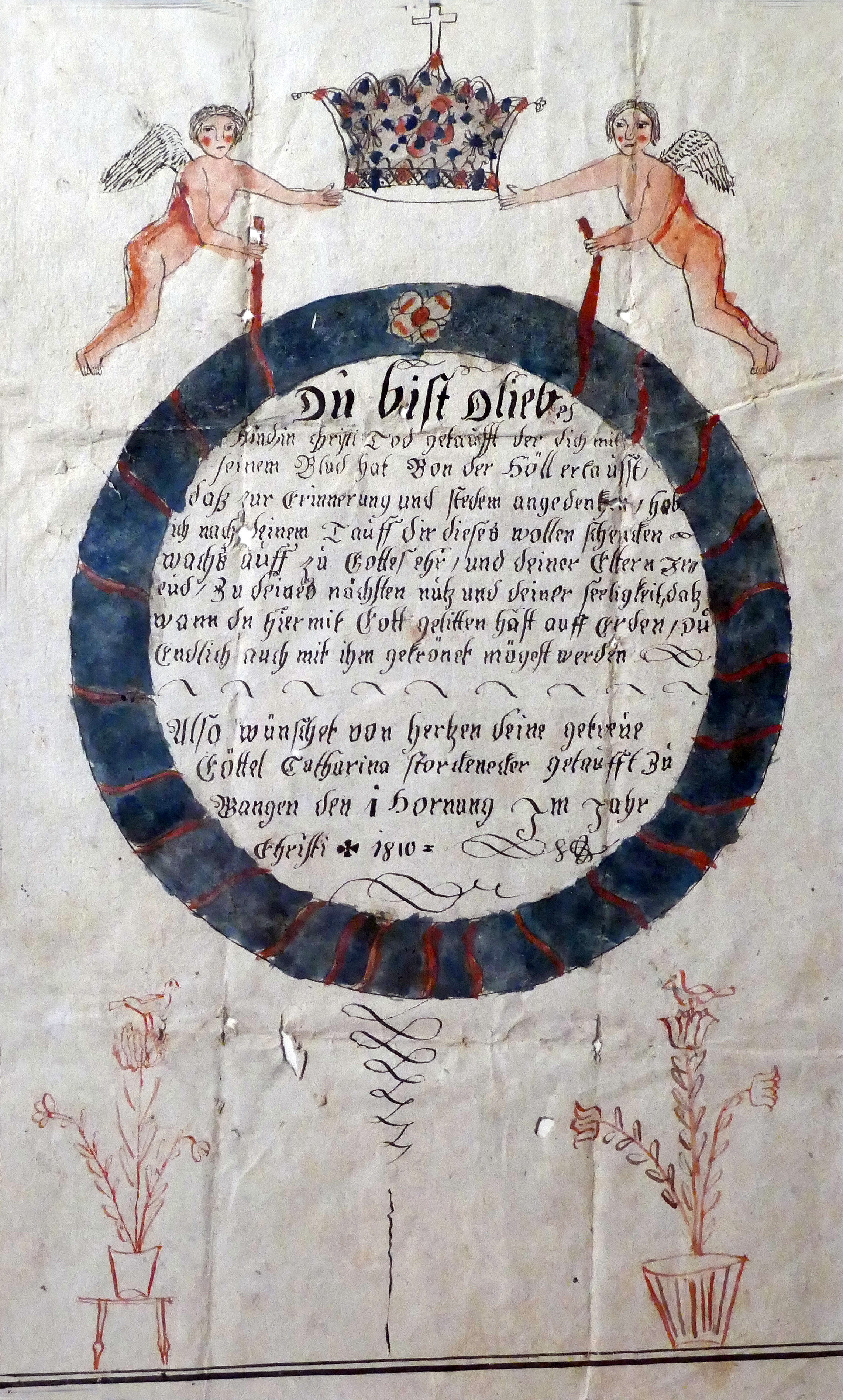 Lettre de baptême manuscrite, décor peint avec anges et couronnes.Wangen, 1810. Elle comporte le texte reproduit pendant près de 100 ans dans de nombreuses lettres, manuscrites ou imprimées : Du bist, o liebes Kind, in Christi Todt getauft ("Tu as été baptisé, cher enfant, dans la mort du Christ"). Exposition Vies protestantes : le mot et l'image au Musée alsacien de Strasbourg (2017)